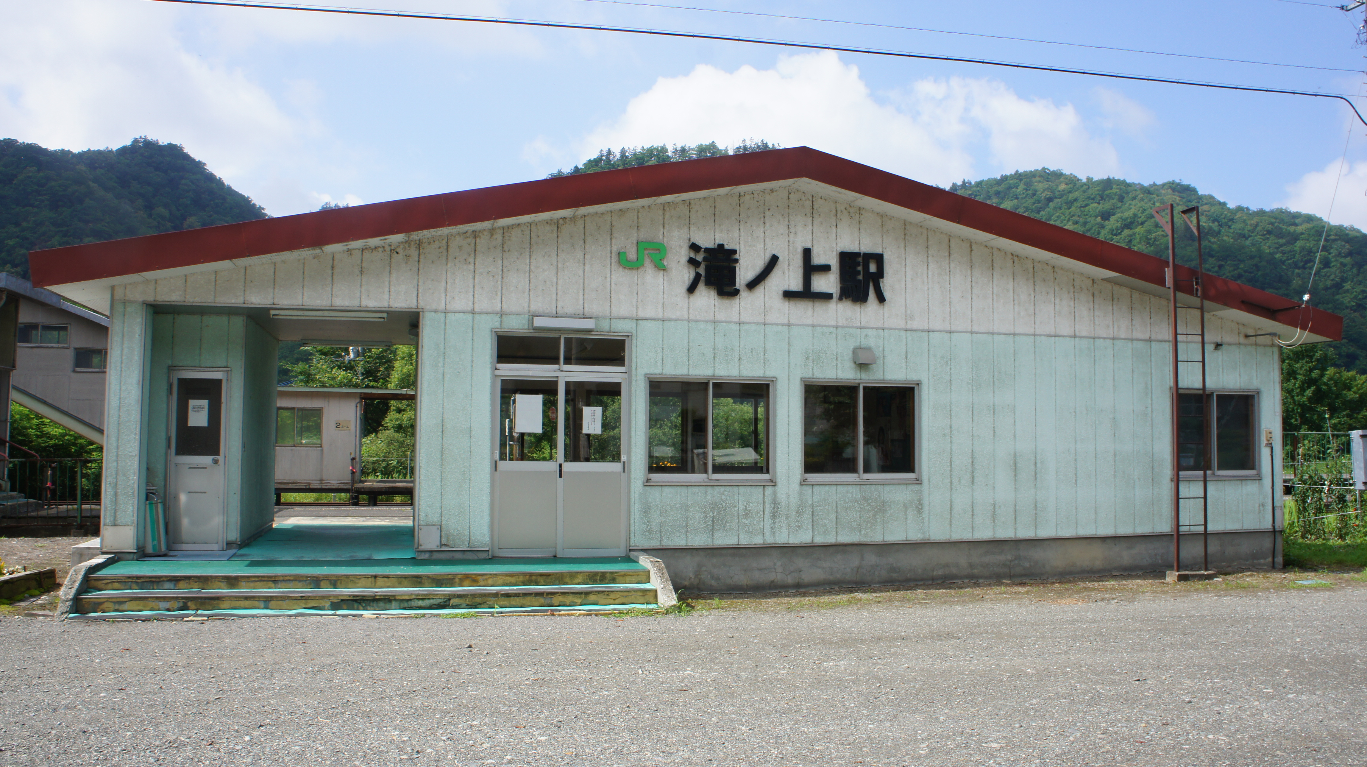 JR石勝線・滝ノ上駅の駅舎